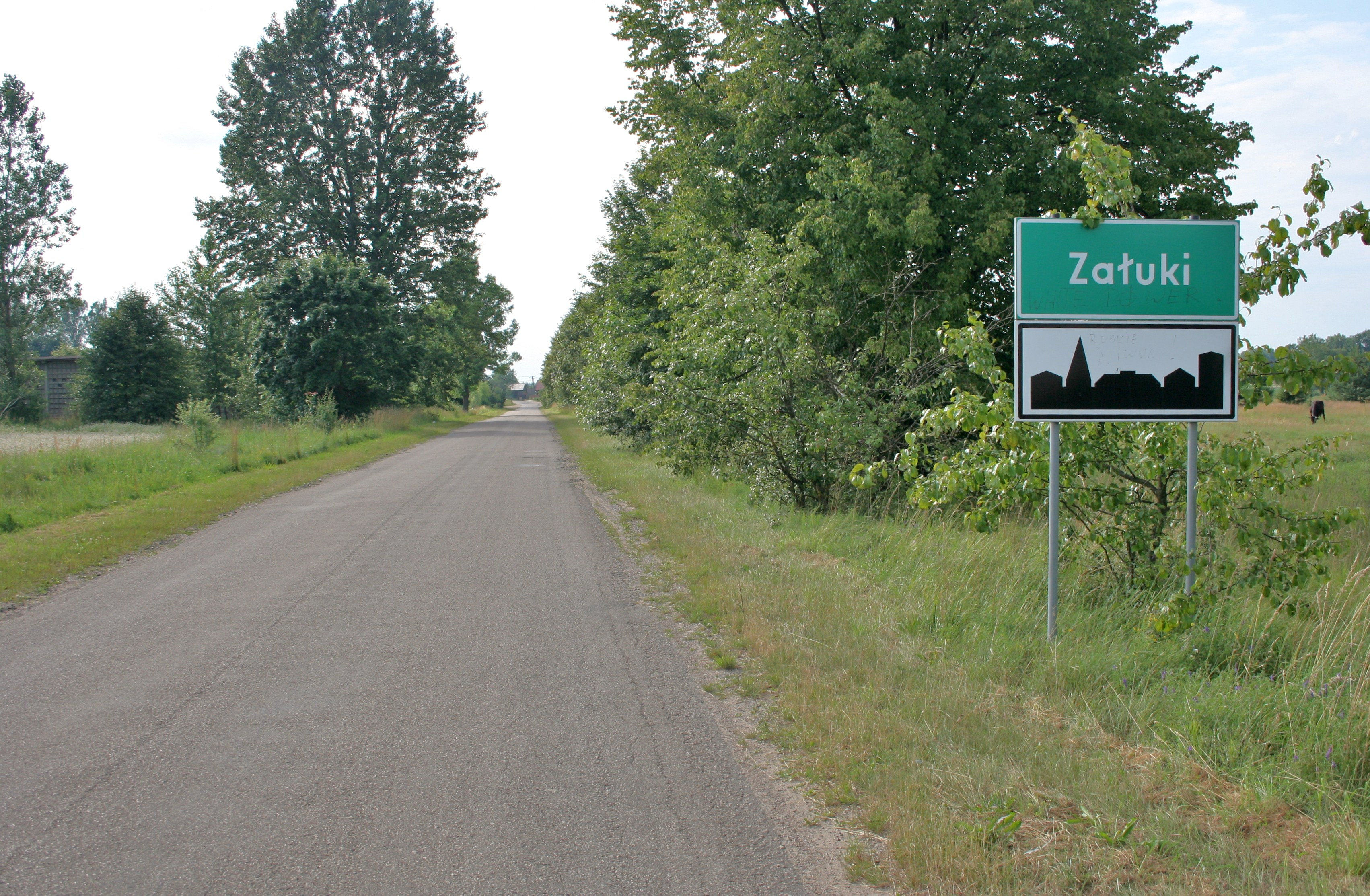 Droga wjazdowa do wsi Załuki.